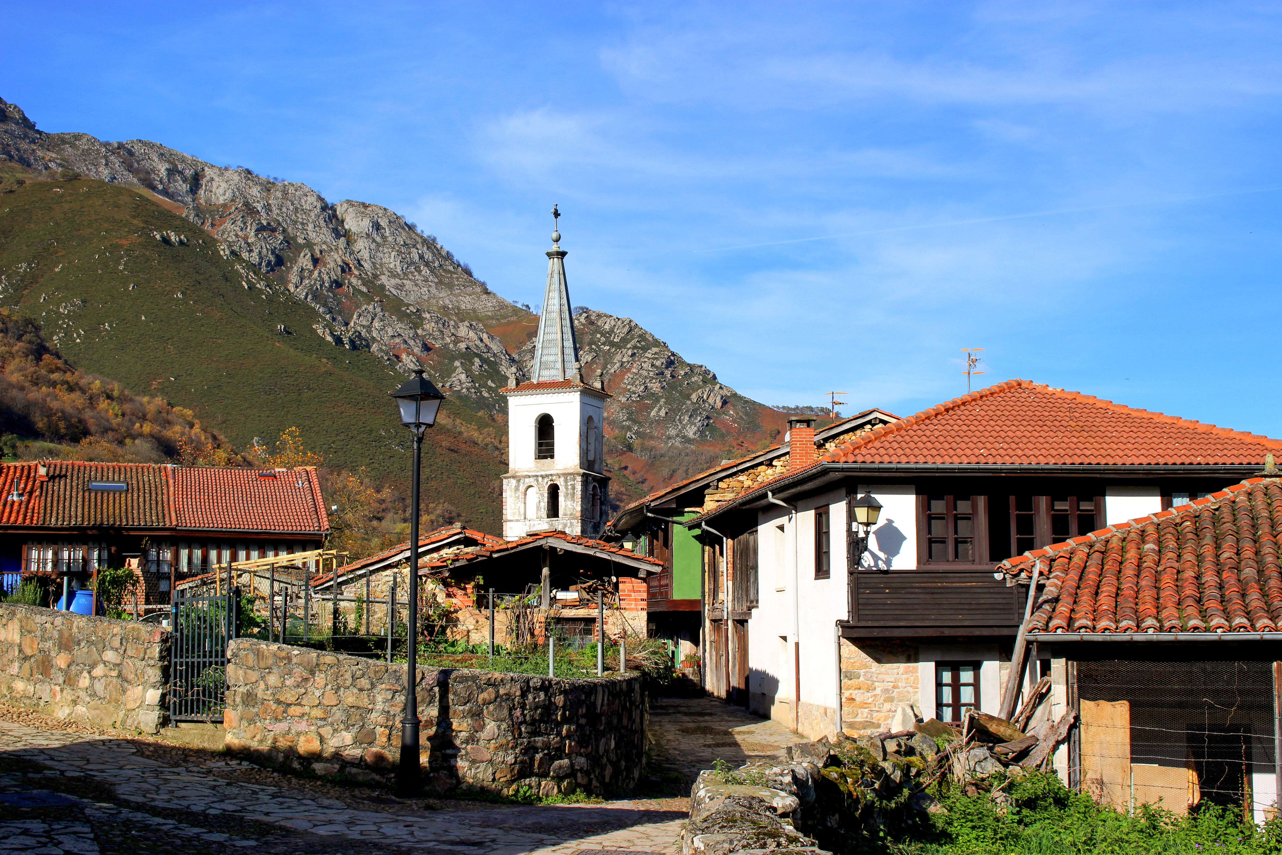 Soto de Agües (parroquia de San Andrés de Agües, Sobrescobio, Asturias)